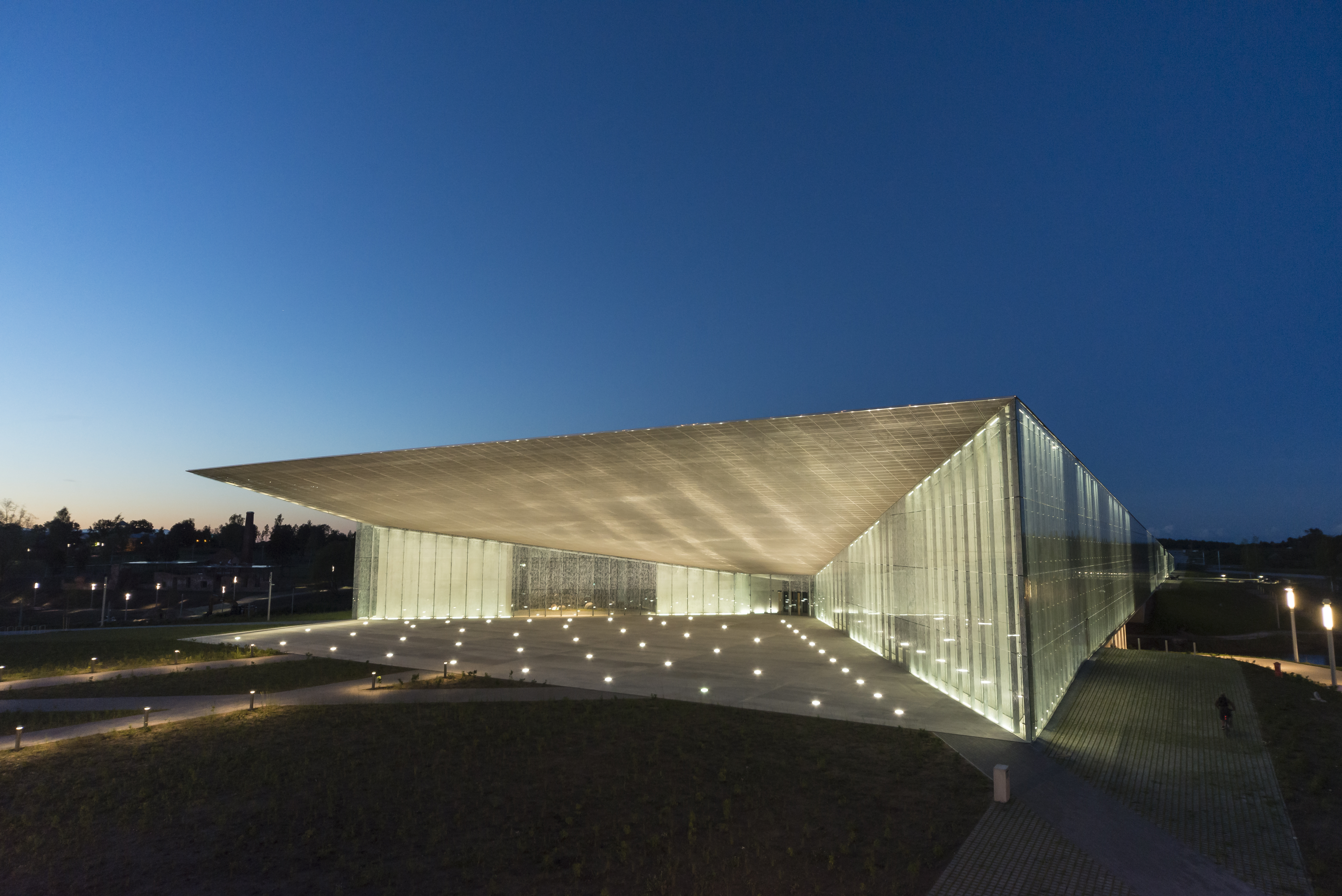 Eesti Rahva Muuseumi peahoone